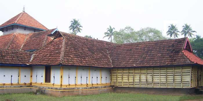 ശൃംഗപുരംക്ഷേത്രം